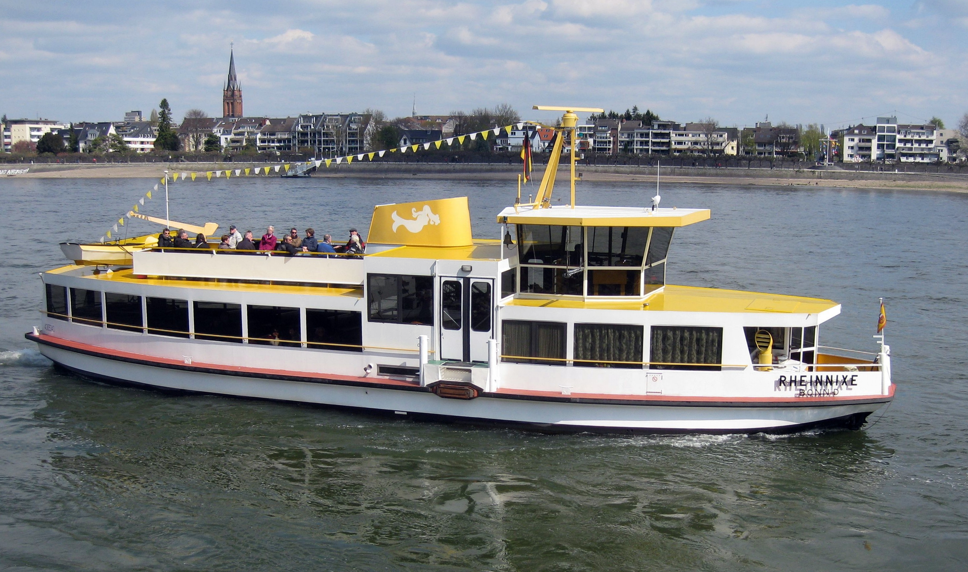 Bonn; Rheinfähre «Rheinnixe» auf dem Rhein; querab vor dem Anleger am Bonner Brassert-Ufer.